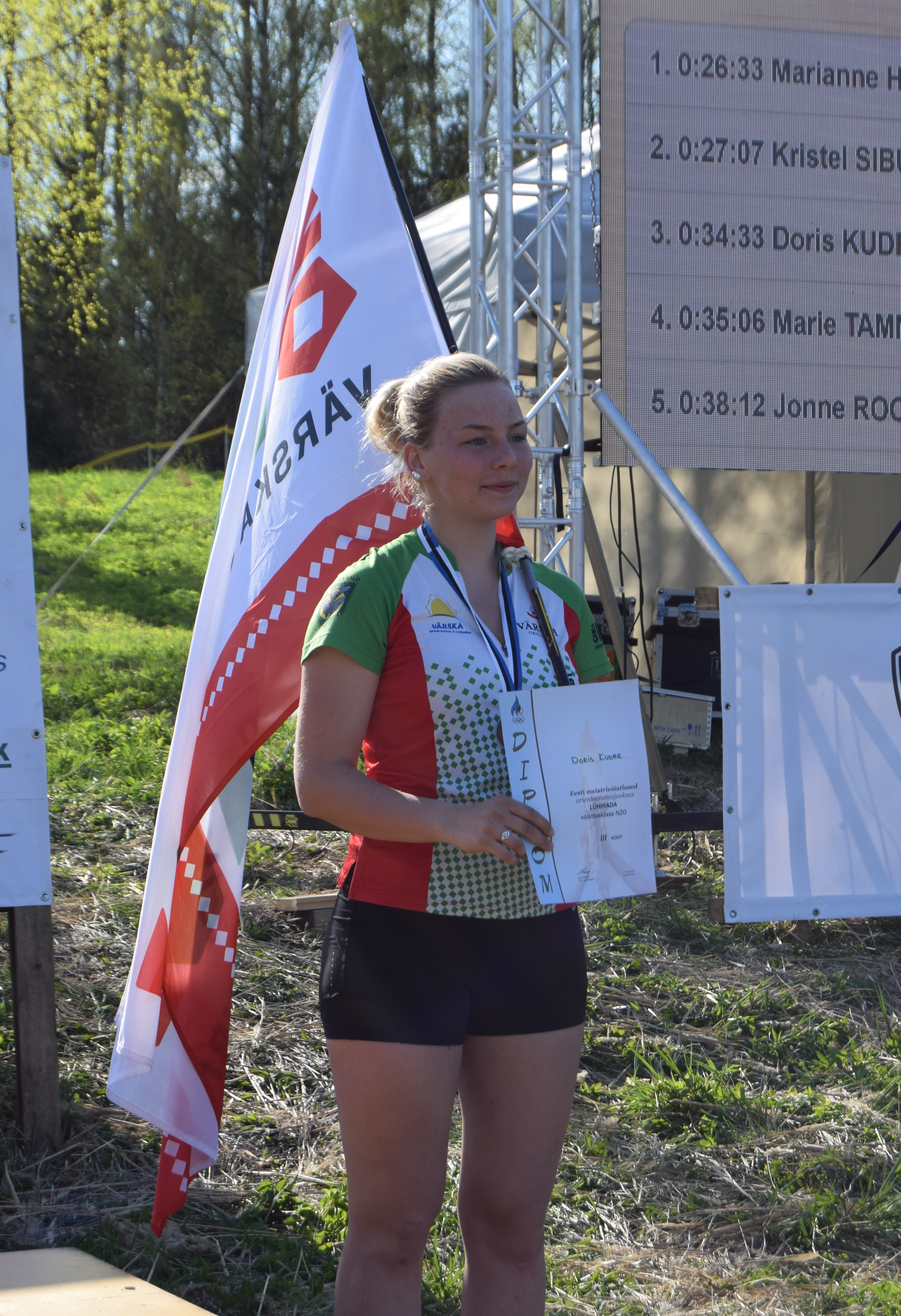 Doris Kudre 2016